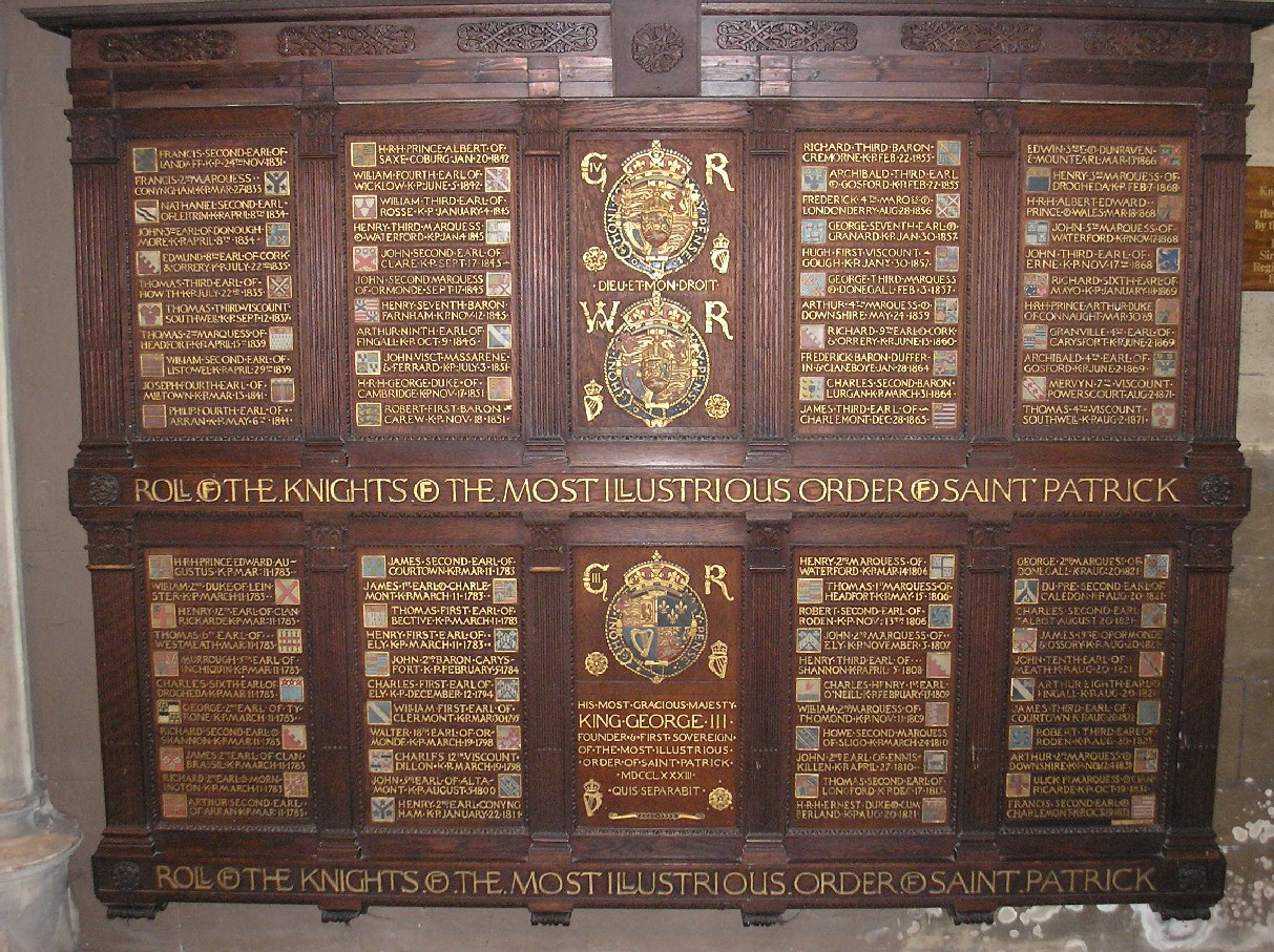 taken by Valdoria, august 2006